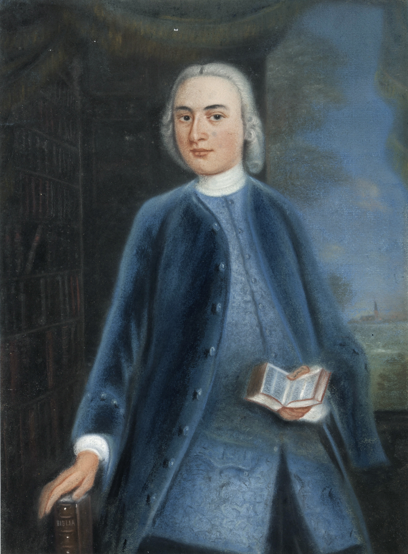 Pastelportret van Lambertus van Bolhuis (1741-1826) door waarschijnlijk Lambertus Beckeringh